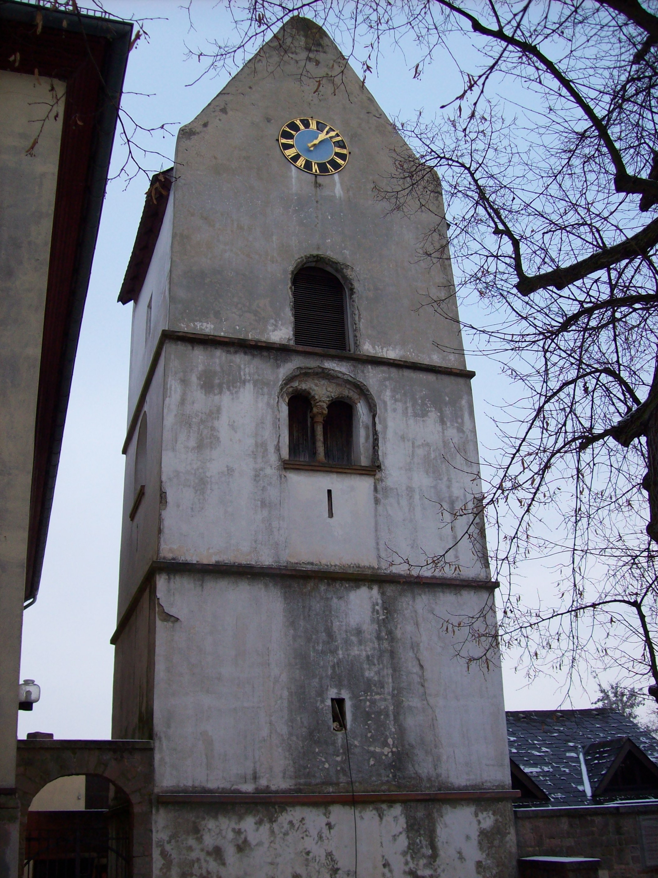 Freistehender Wehrturm, 13. Jahrhundert, Frei-Laubersheim, Rheinland-Pfalz